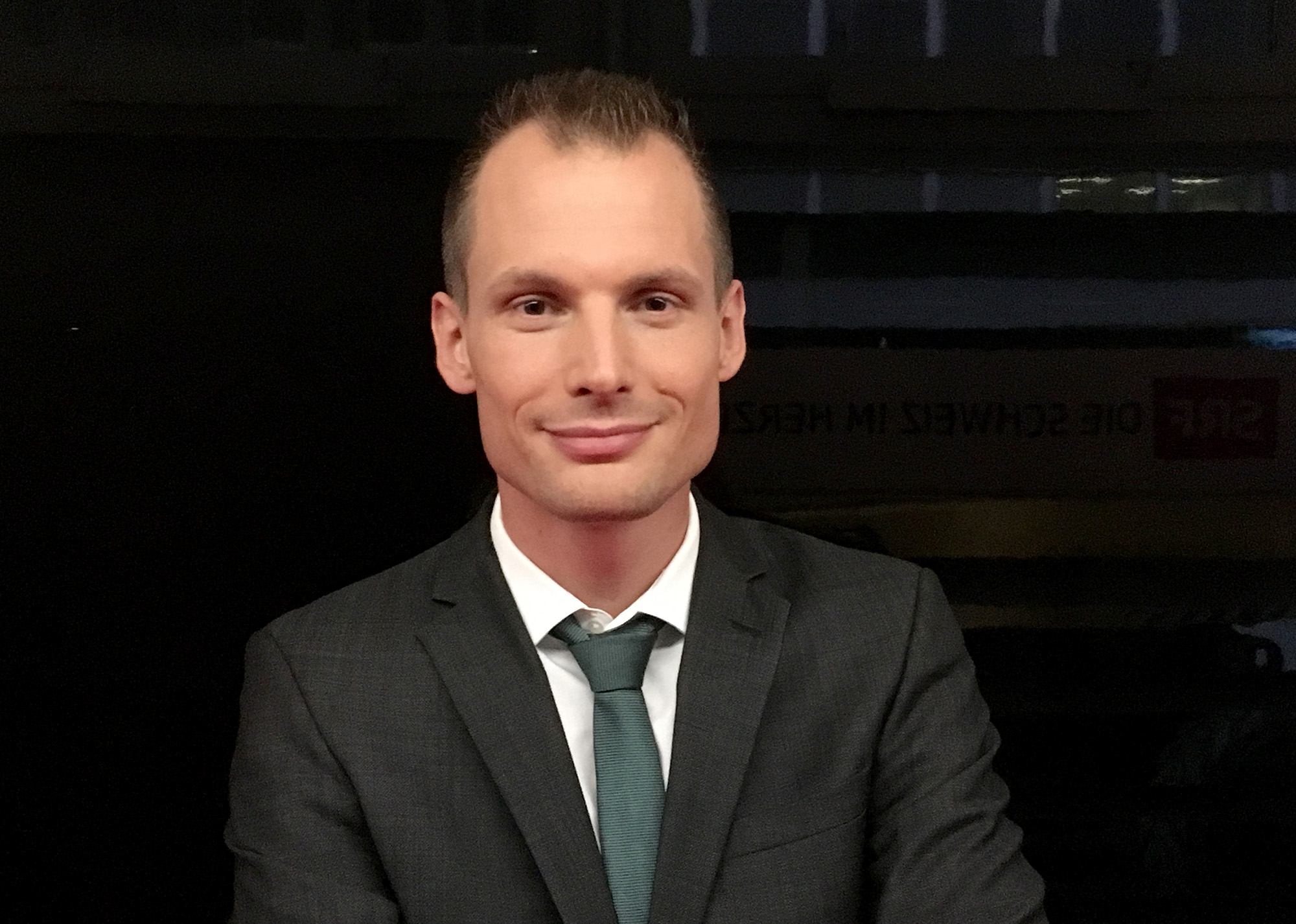 Jonas Projer, nach der Arena-Sendung vom 16. Juni 2017